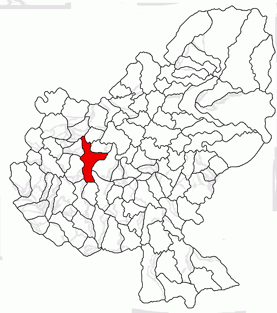 Categorie:Hărţi ale judeţului Mureş